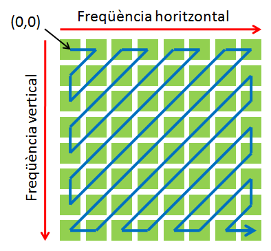 Metodo de lectura de datos One step in JPEG compression/decompression.